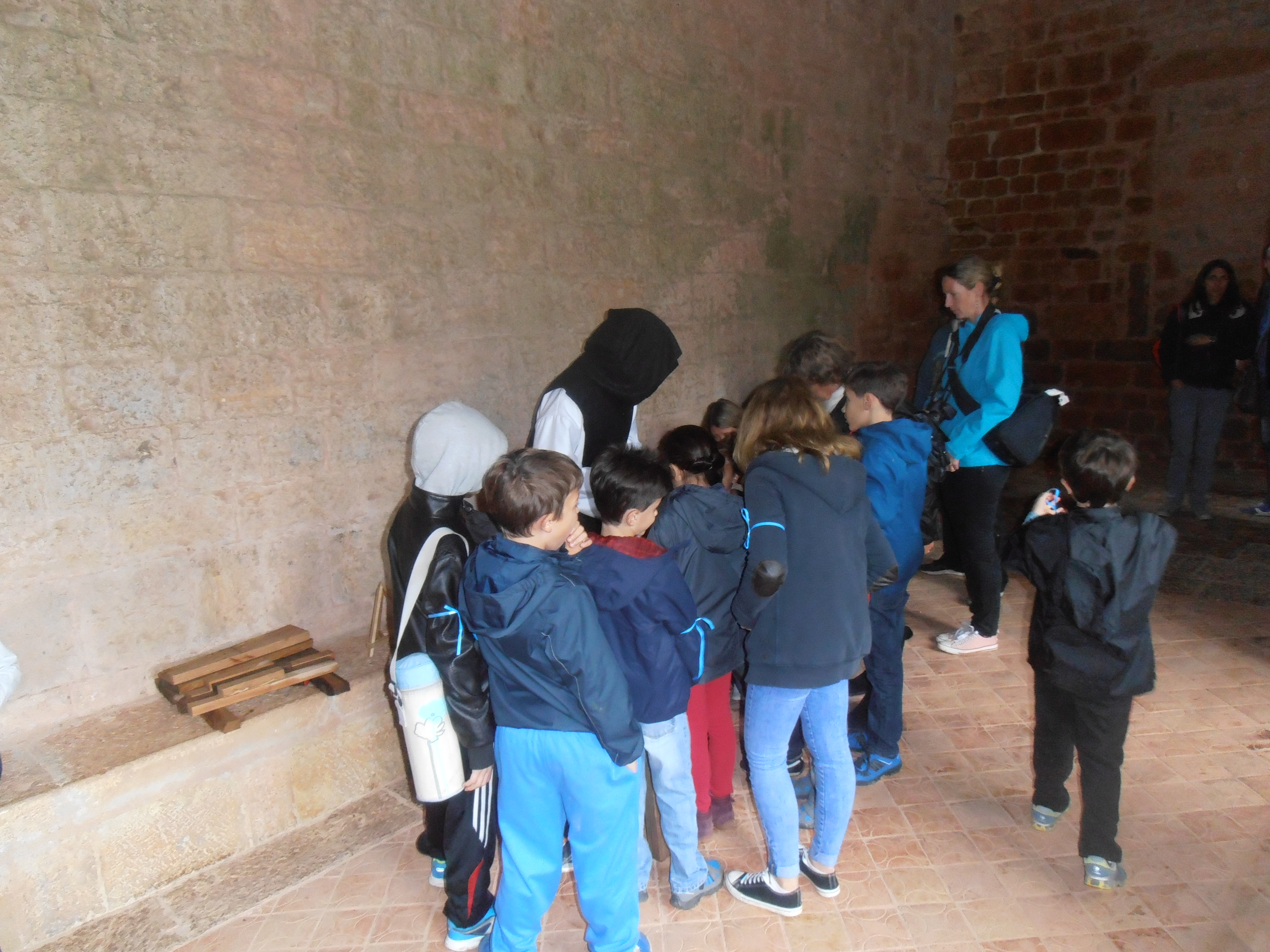 Var, Le Thoronet Monument jeu d'enfant, Abbaye du Thoronet, Centre des monuments nationaux : Énigme à l'abbaye, samedi 22 et dimanche 23 octobre 2016. Parcours ludique et familial, sous forme d'une énigme au cours de laquelle petits et grands ont découvert la vie de l'abbaye au Moyen-Âge : Ateliers de démonstration des activités des moines : calligraphie, enluminure, herboristerie, filage et tissage, travail du cuir et du bois, chants grégoriens.